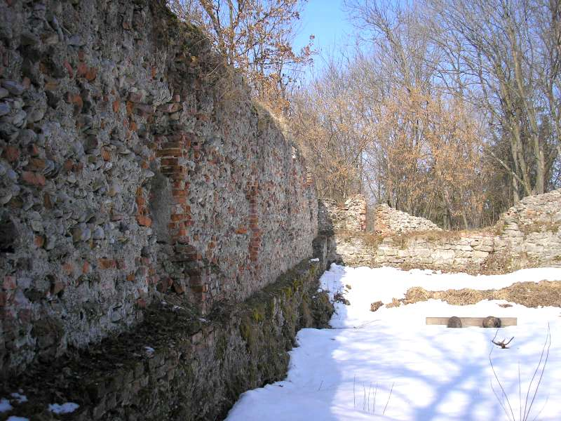 Burg Haltenberg, Die Reste des Herrenhauses nach Norden